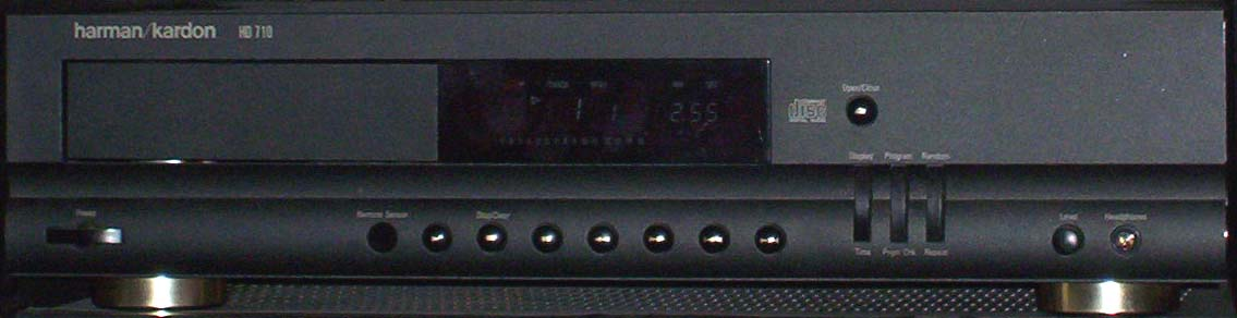 CD-Player